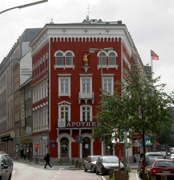 Gebäude am Georgsplatz 16 in Hamburg. Das Haus gilt als typisches Beispiel für die nach dem Hamburger Brand auf den freigewordenen Flächen errichtete Bebauung ("Nachbrandarchitektur"). Viele Beispiele für diese Architektur sind nicht erhalten. Übrigens befand sich zum Zeitpunkt der Aufnahme nicht die Apotheke Niemitz in dem Haus. Das Erdgeschoß war ersichtlich im Zustand der Renovierung. This is a photograph of an architectural monument.